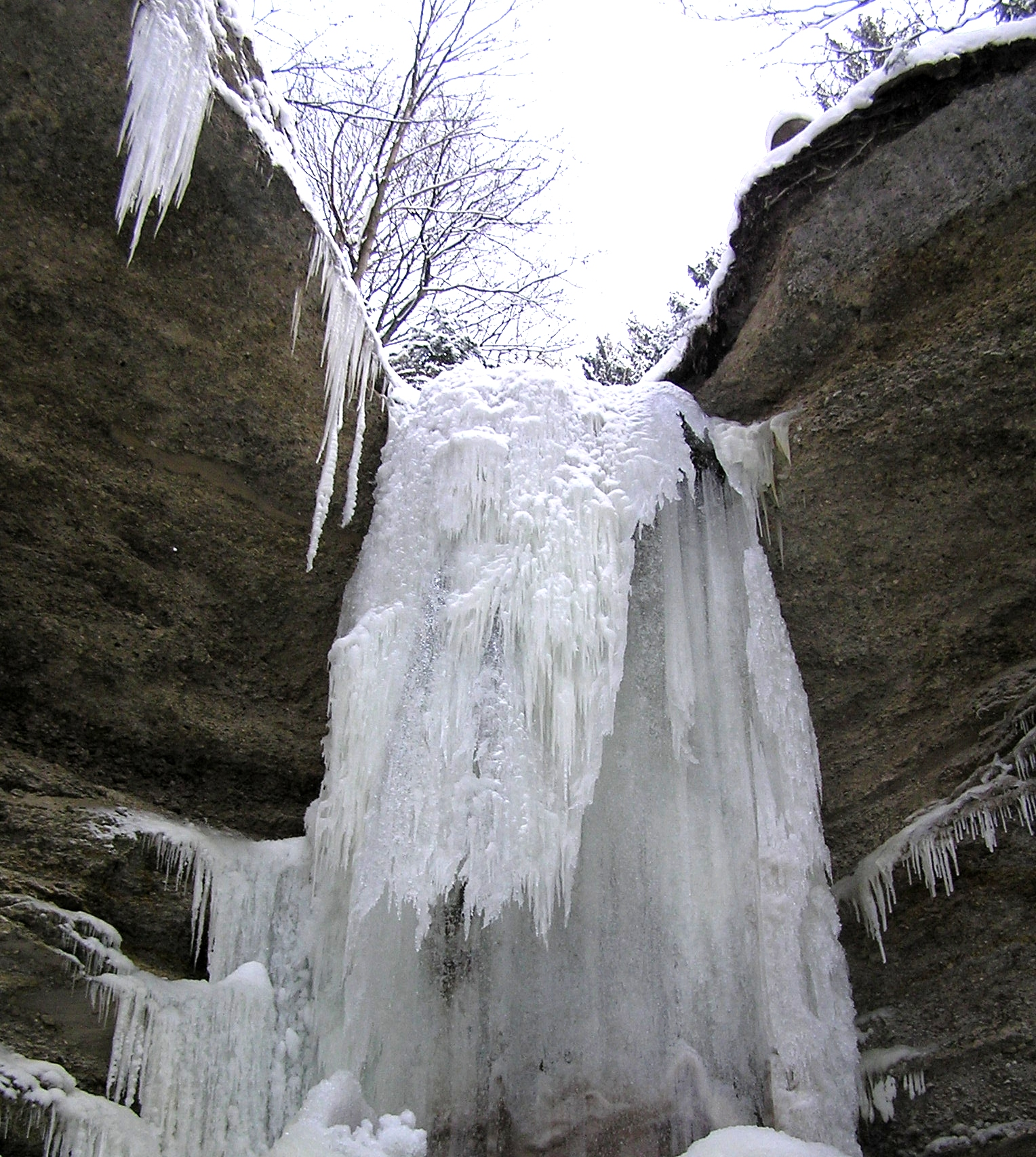 Wasserfall am östlichen Ende des Geotops "Pähler Schlucht" im Winter.